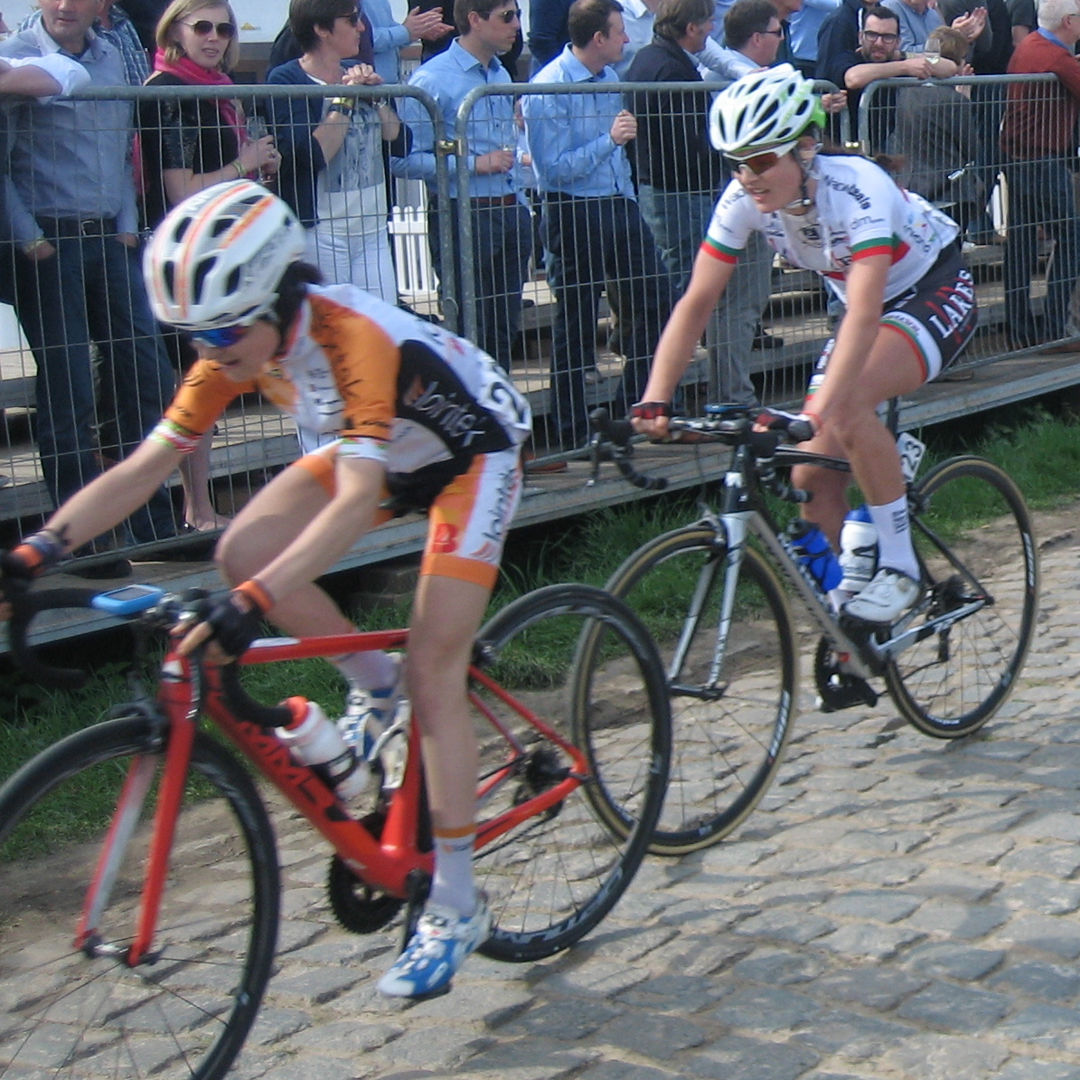 Eider Merino en Daniela Reis op de Oude Kwaremont in de Ronde van Vlaanderen voor vrouwen 2017.